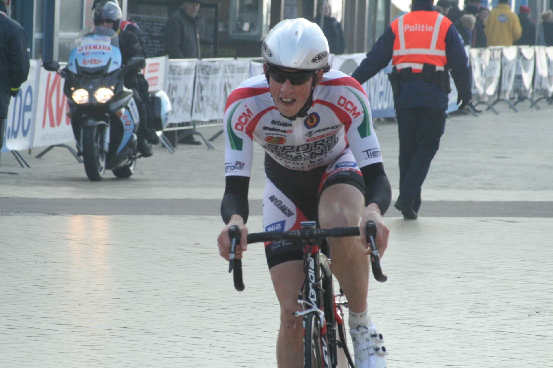 Driedaagse van West-Vlaanderen 2011, proloog in Middelkerke